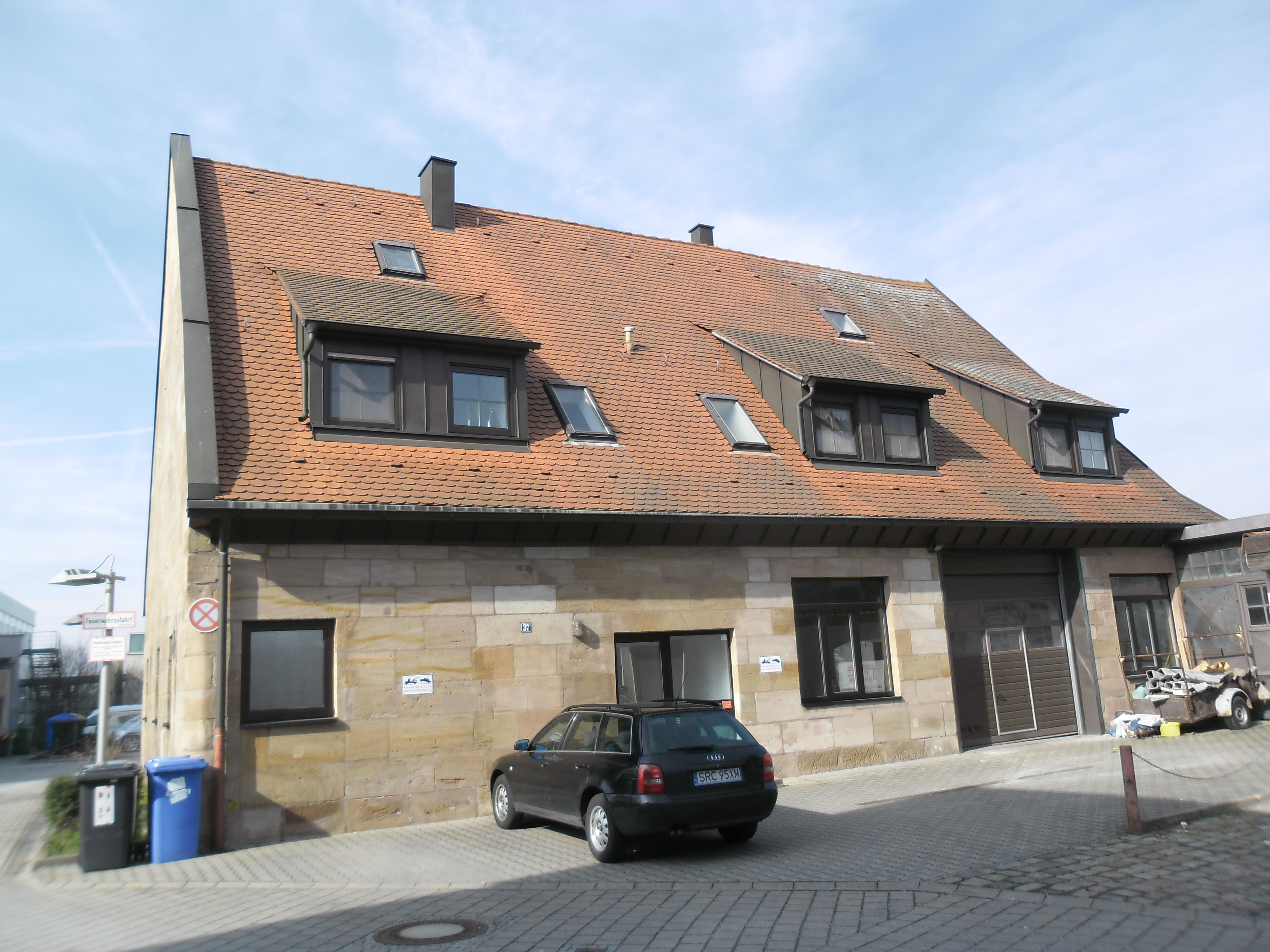 Adolf-Braun-Straße 37